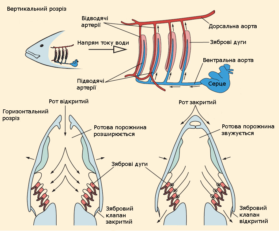 FishGills1.jpg: Кровоносна система риб